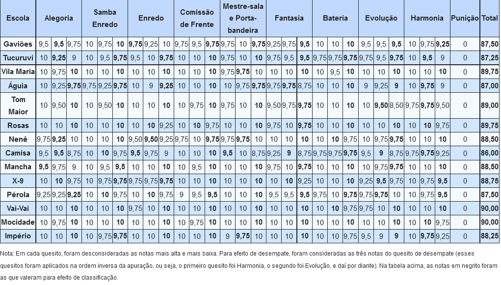 Resultados do Carnaval de São Paulo - 2008